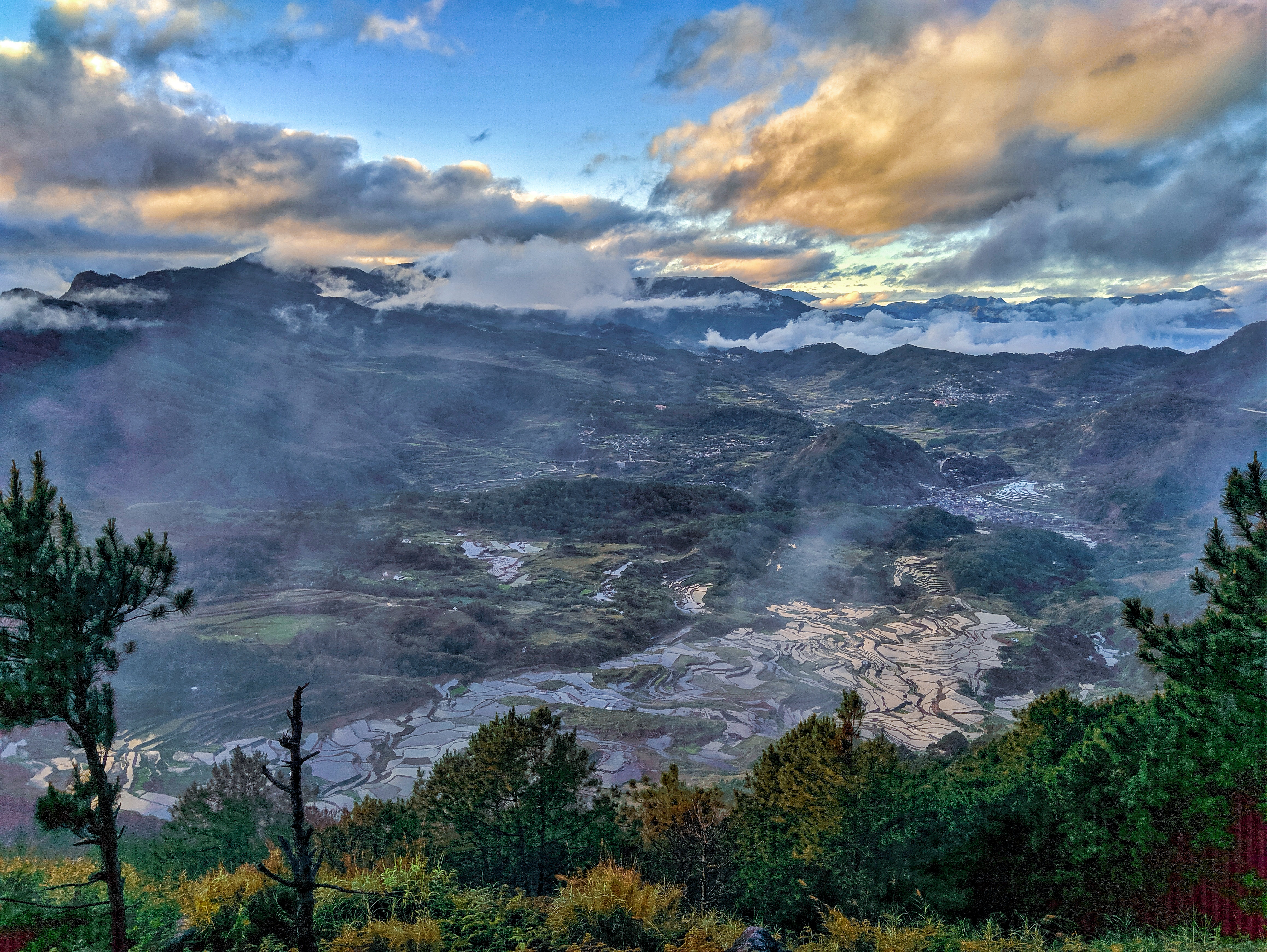 Tagalog: Kuha itong magandang tanawin mula sa Bauko, Benguet. Mula sa Mt. Polis pababa nito, may madadaanang viewpoint at masisilayan ang rice terraces na ipinagmamalaki ng Bauko.